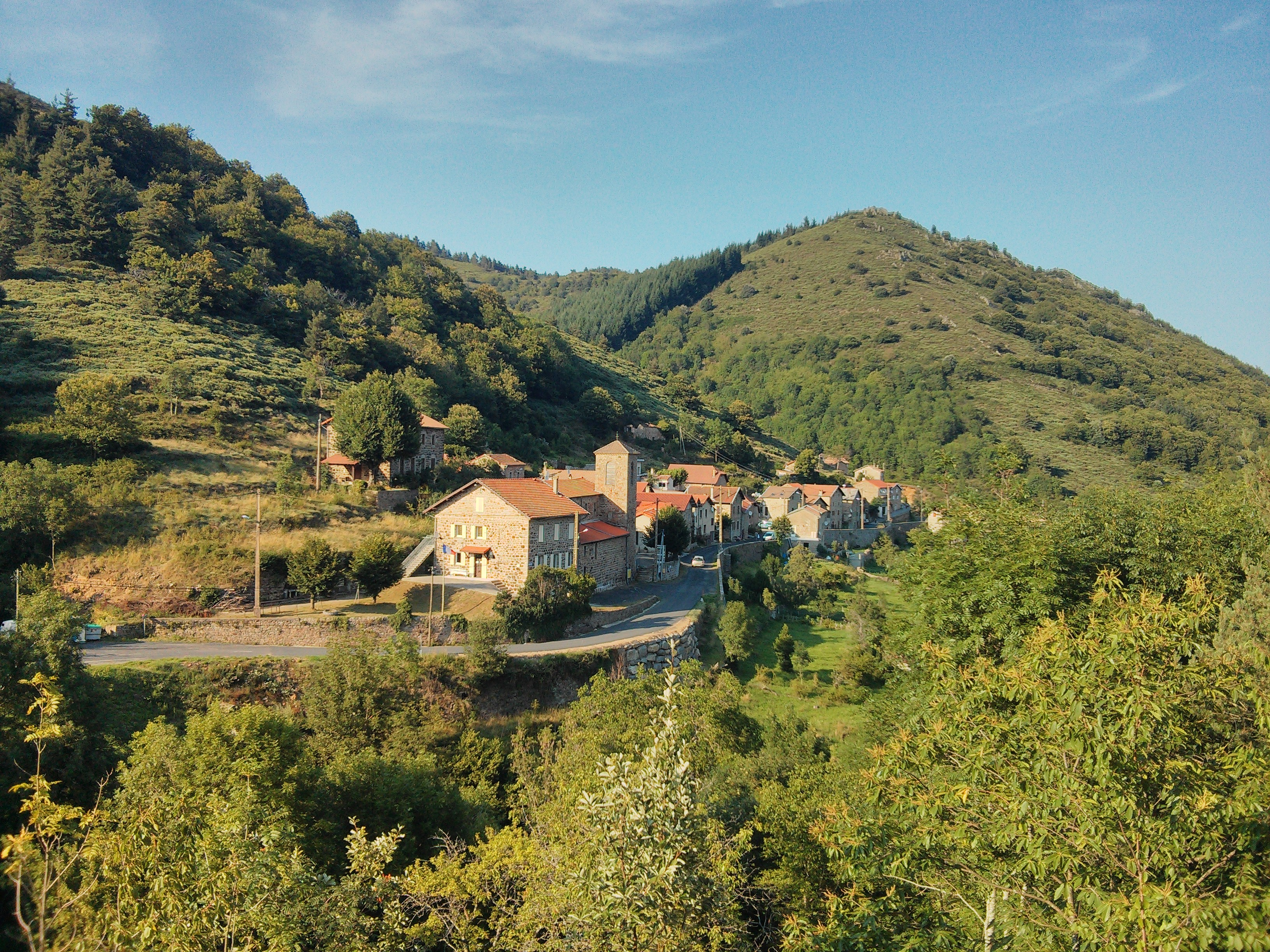 vue sur la mairie et l'église du Chambon